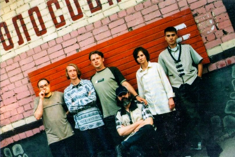 Слева направо: Дюша Глебович, Дмитрий Путченков, драматург Вячеслав Дурненков, драматург Вадим Леванов, Галина Матюшкова, Илья Дзей. Театральный центр "Голосова 20", Тольятти. Россия.